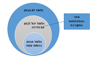 תרשים שמתאר את התיאוריההקוגנטיבית של לב ויגוצקי לגבי אזור ההתפתחות המקורבת.